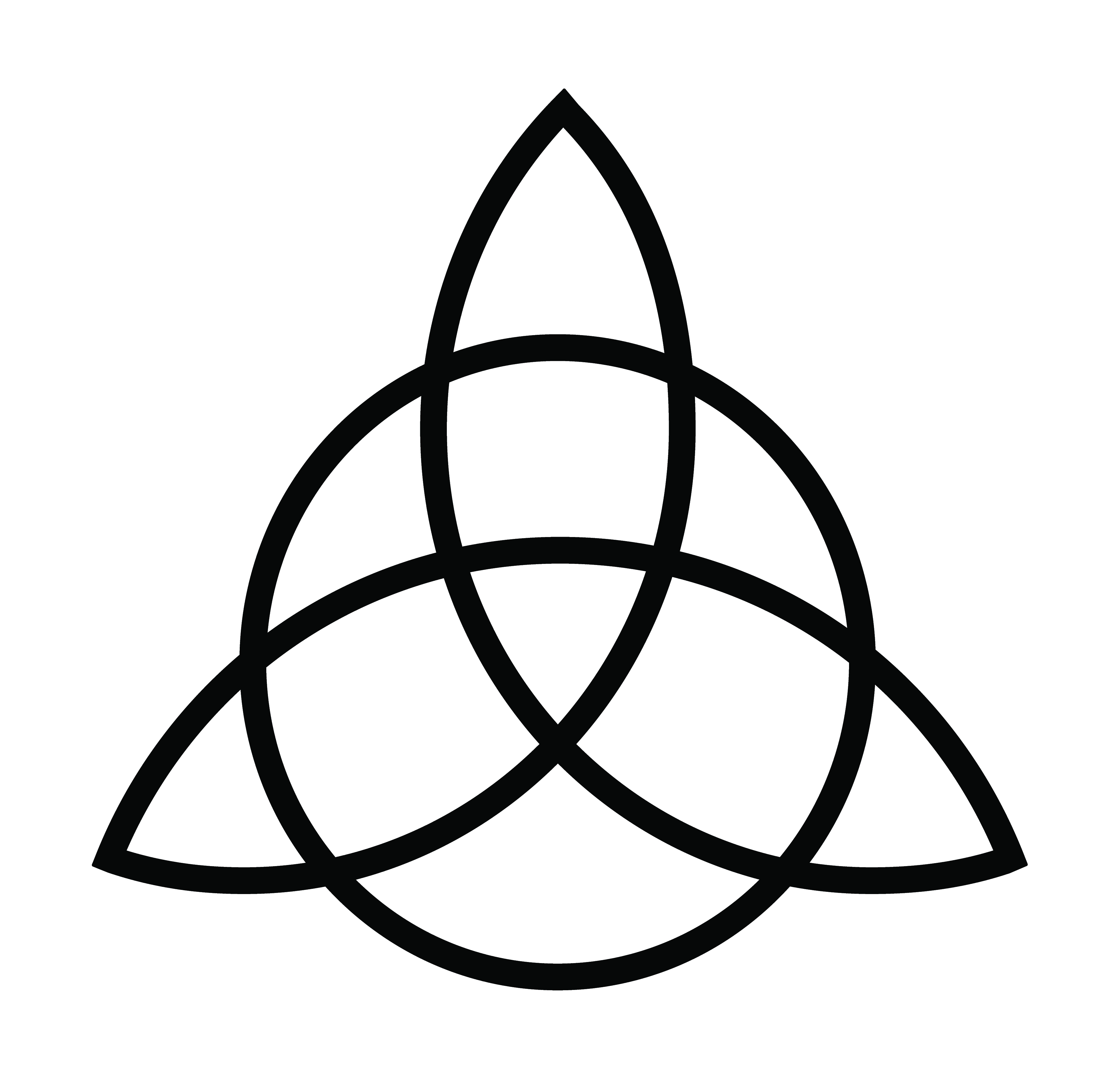 The Triquetra